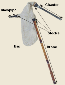 Structure of a Bulgarian bagpipe.